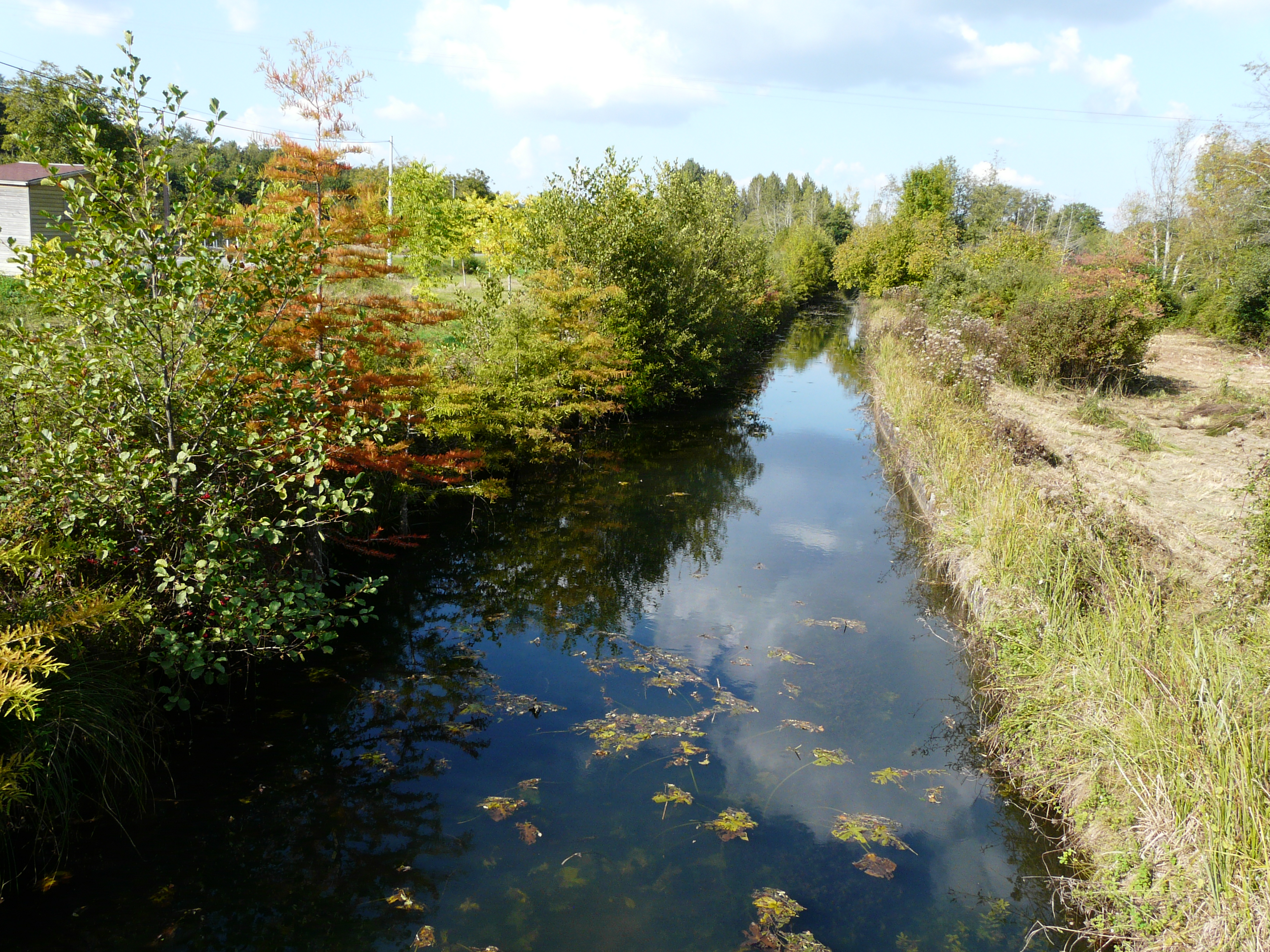 La Beauronne (vue vers l'amont) à Maine moulin, Beauronne, Dordogne, France